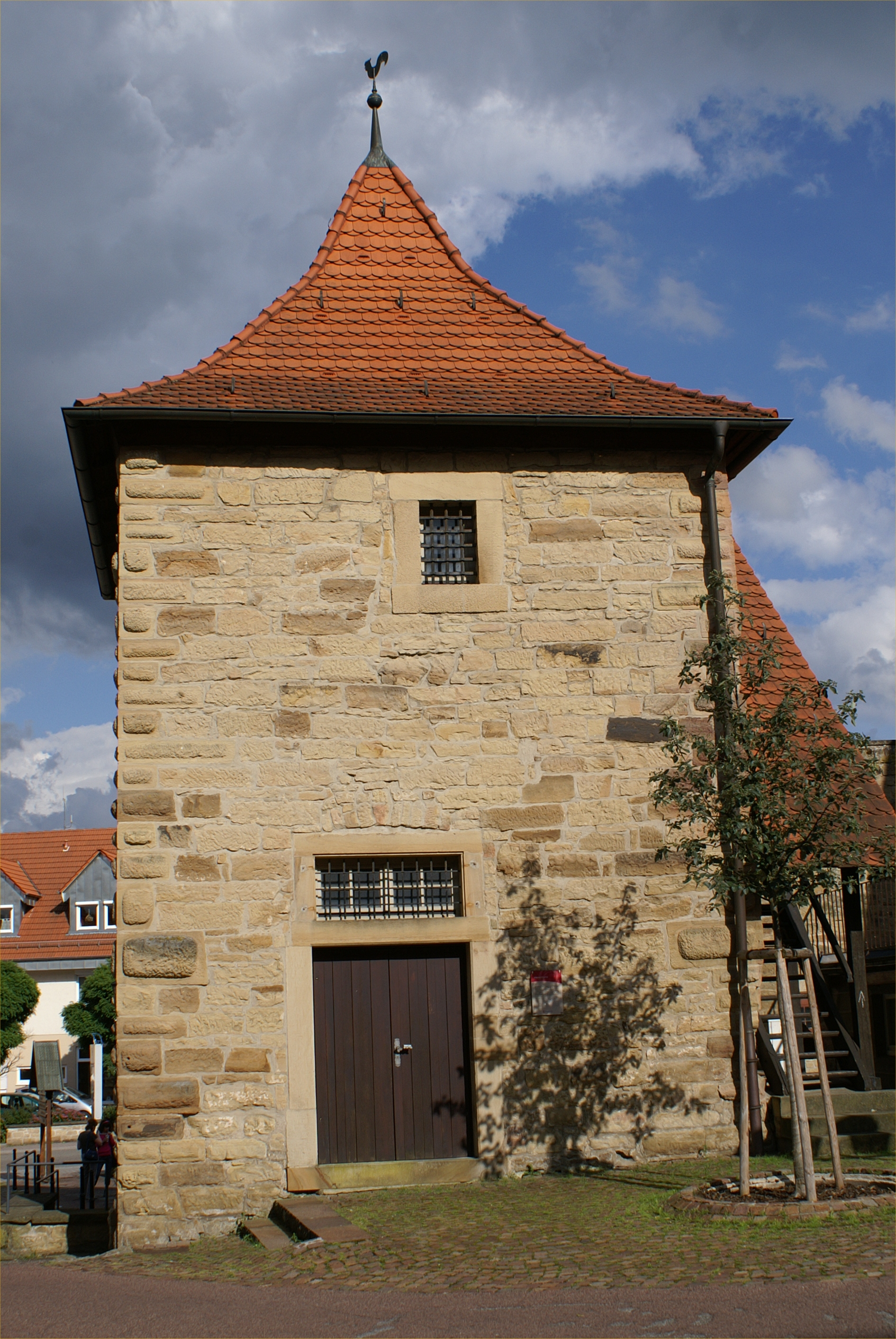 Der Hexenturm in Oberderdingen war früher einer von mehreren Wachtürmen um den Amthof. Früher wurden hier der Hexerei verdächtige Personen eingesperrt. Im Hexenturm befindet sich heute eine Ausstellung über den Amthof.